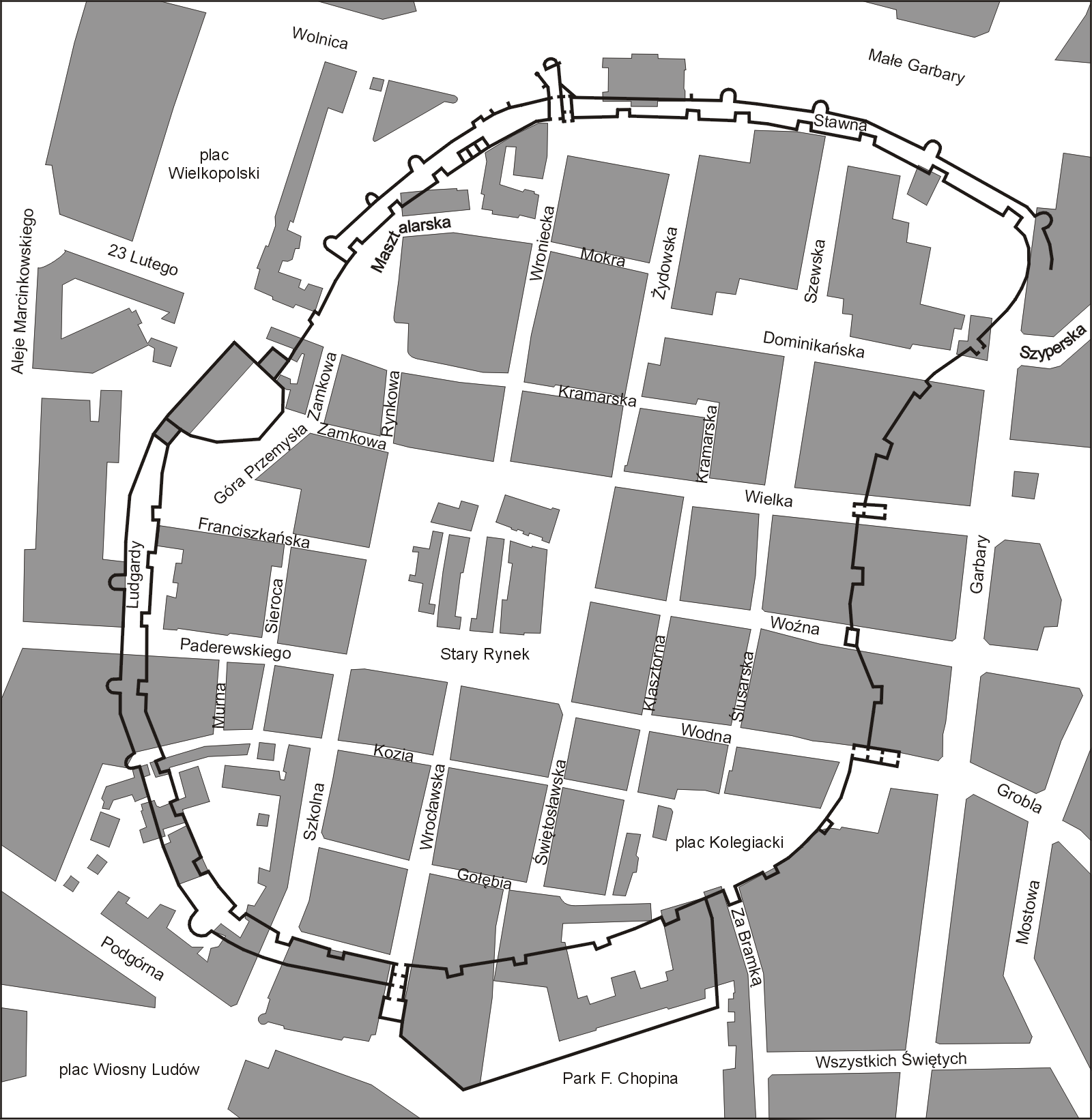 Stare Miasto w Poznaniu